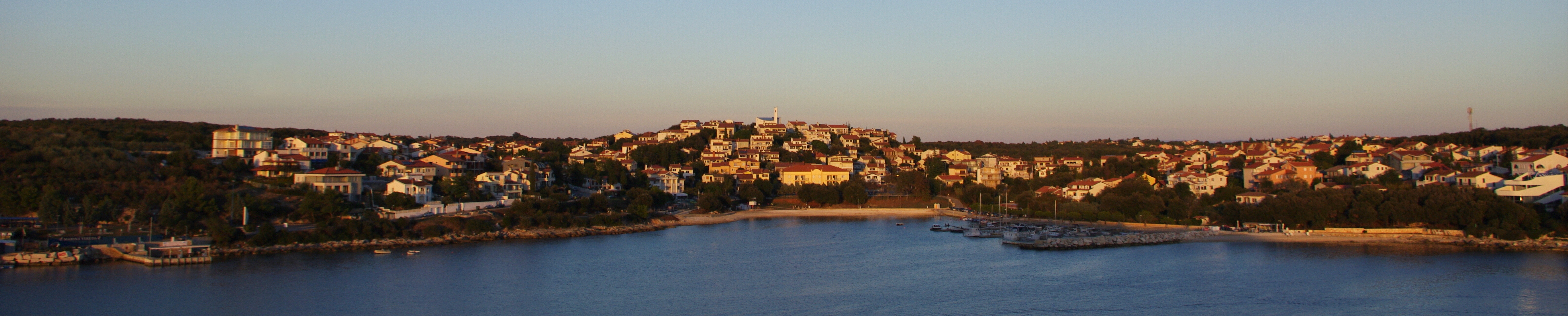 pjescana uvala - panorama